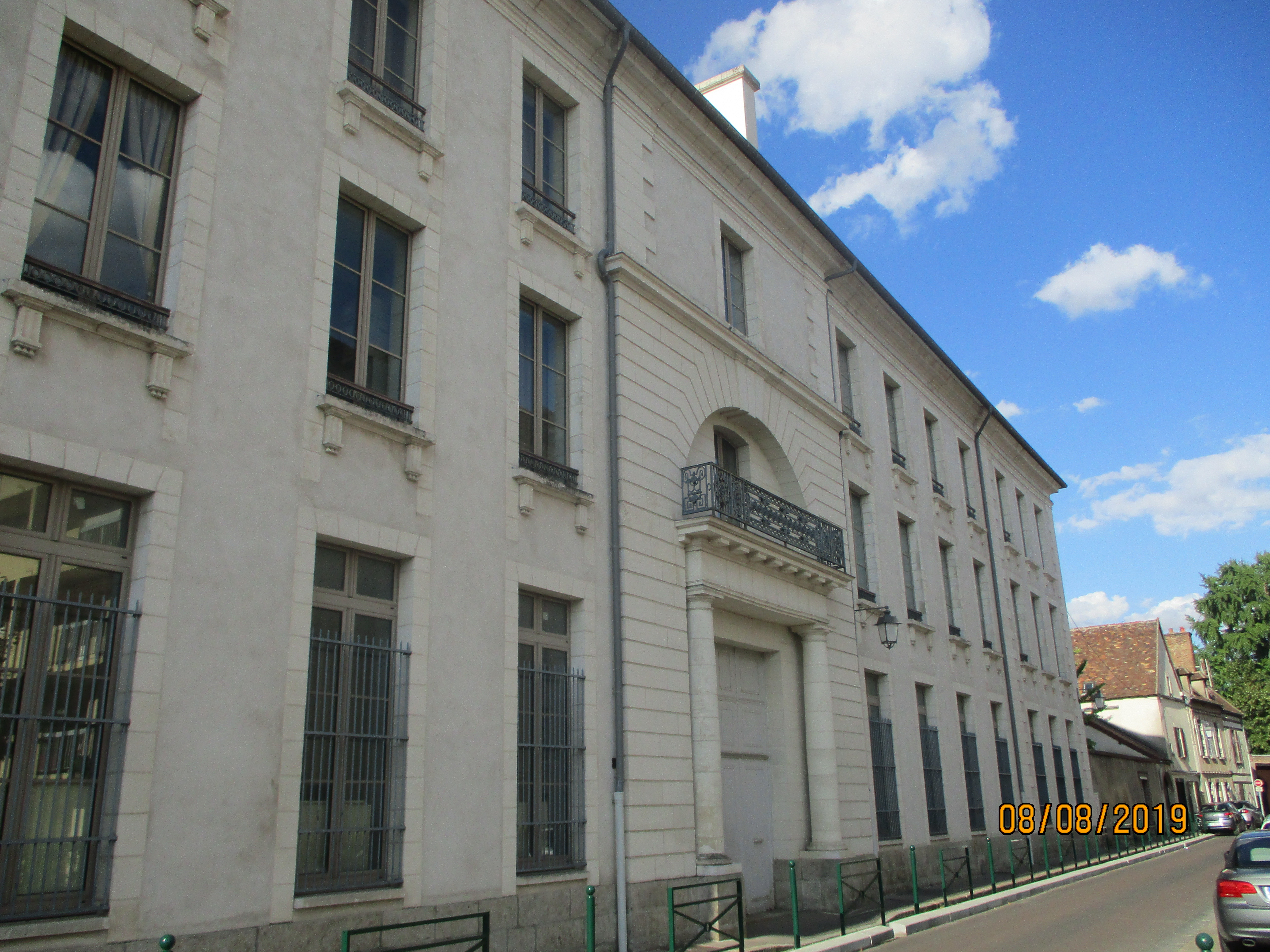 Portail d'entrée de l'ancien séminaire de Sens, aujourd'hui lycée.